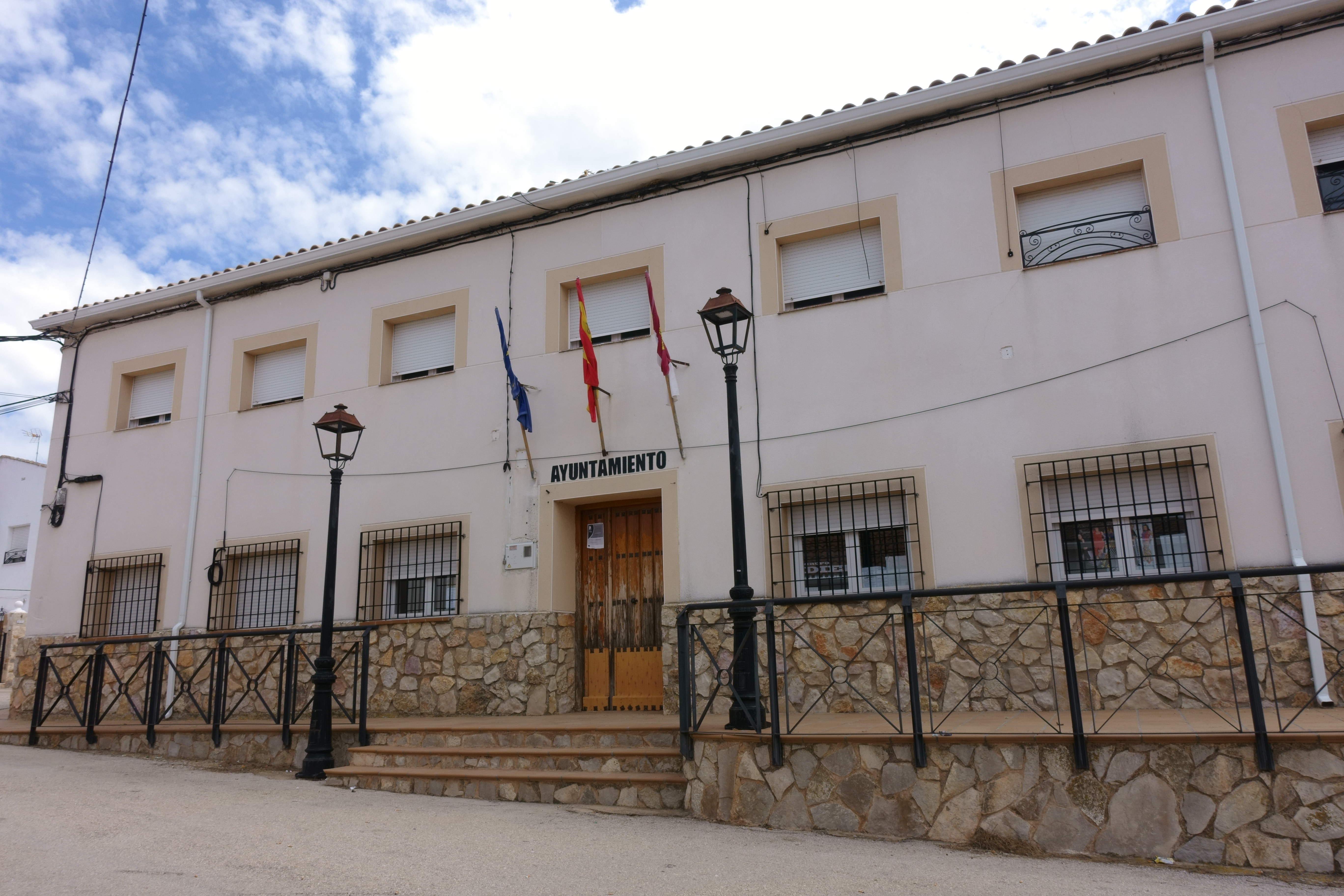 Casa consistorial de Rada de Haro (Cuenca, España).